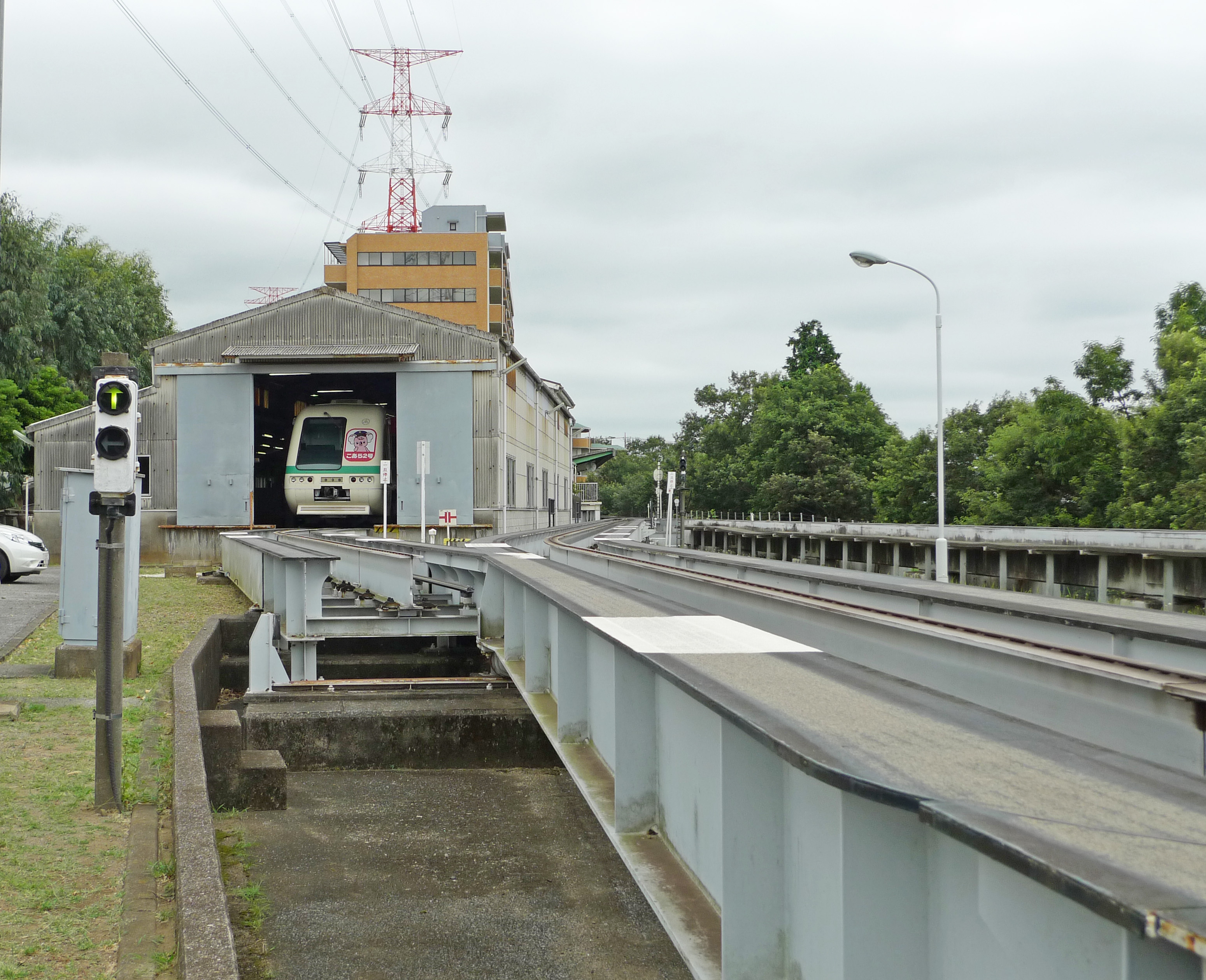 山万ユーカリが丘線車両基地（見学会にて撮影・許可済）